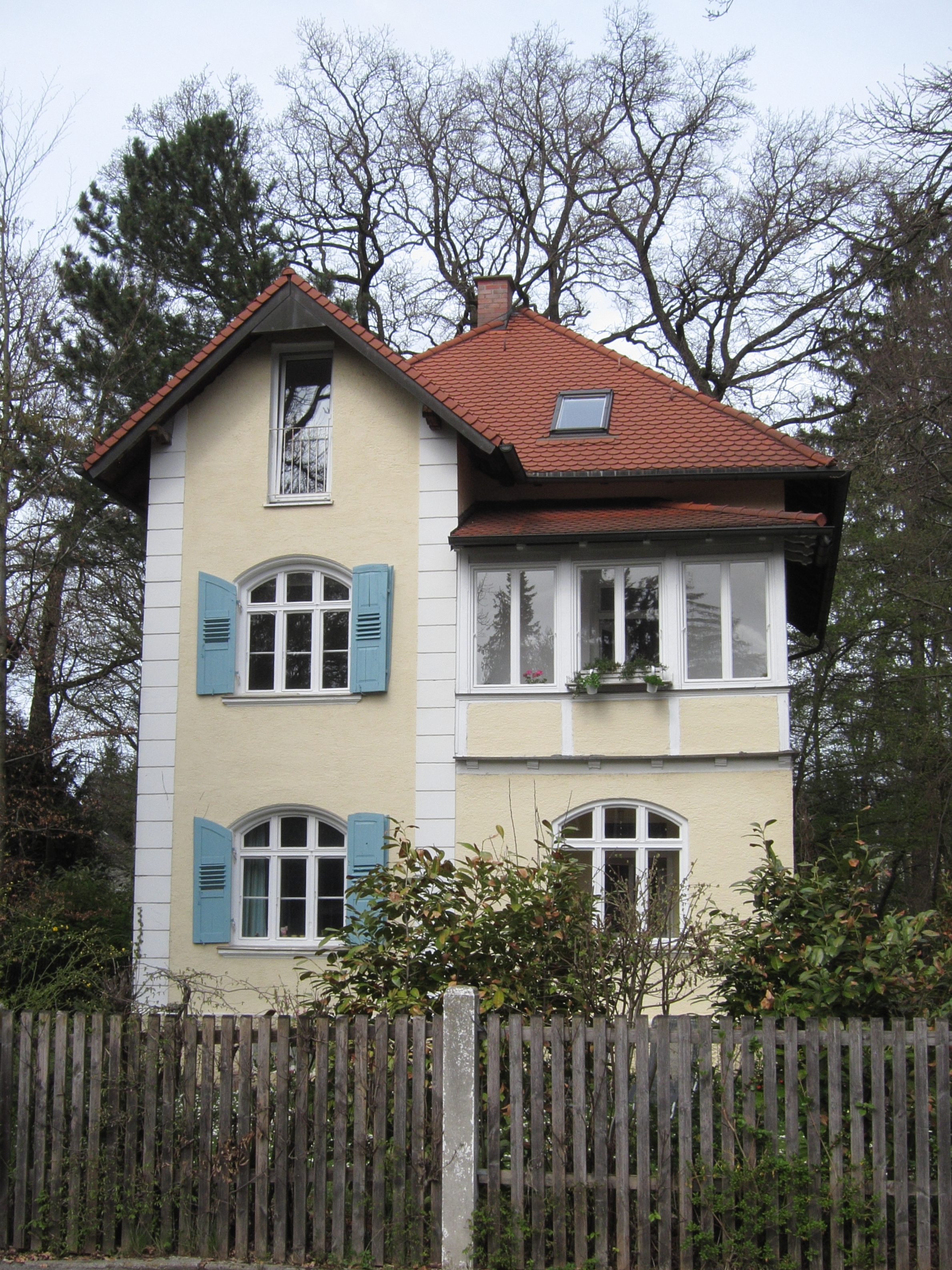 Lichtingerstraße 26; Villa, mit Zwerchhausrisalit und Veranda, 1902 wohl von Andreas Buchinger.